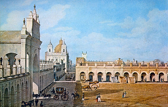 Plaza de la Victoria (frente al sud)